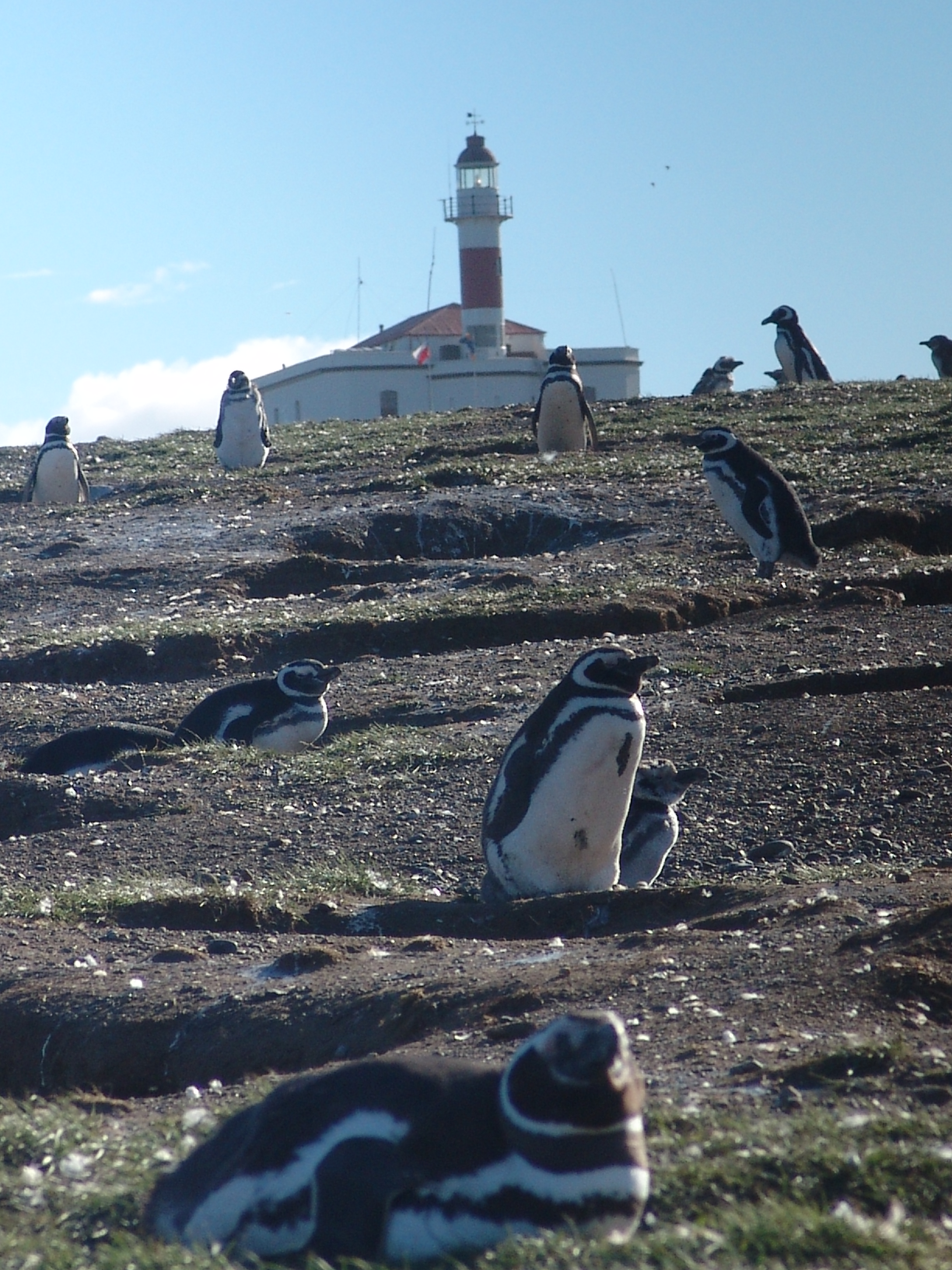 Pingüinos Magallanicos en la Isla Magdalena